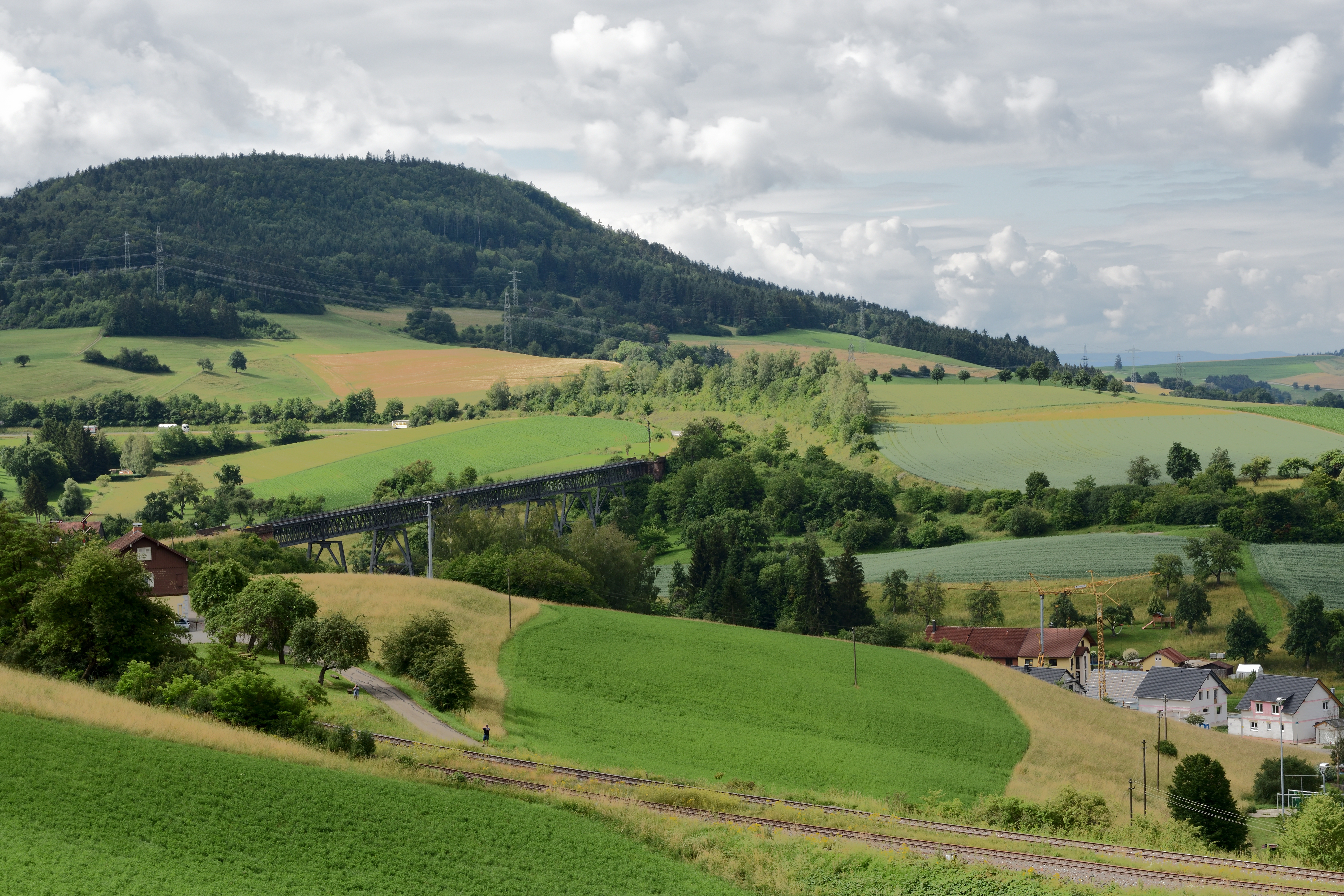 Talbrücke Epfenhofen und Bohlkopf